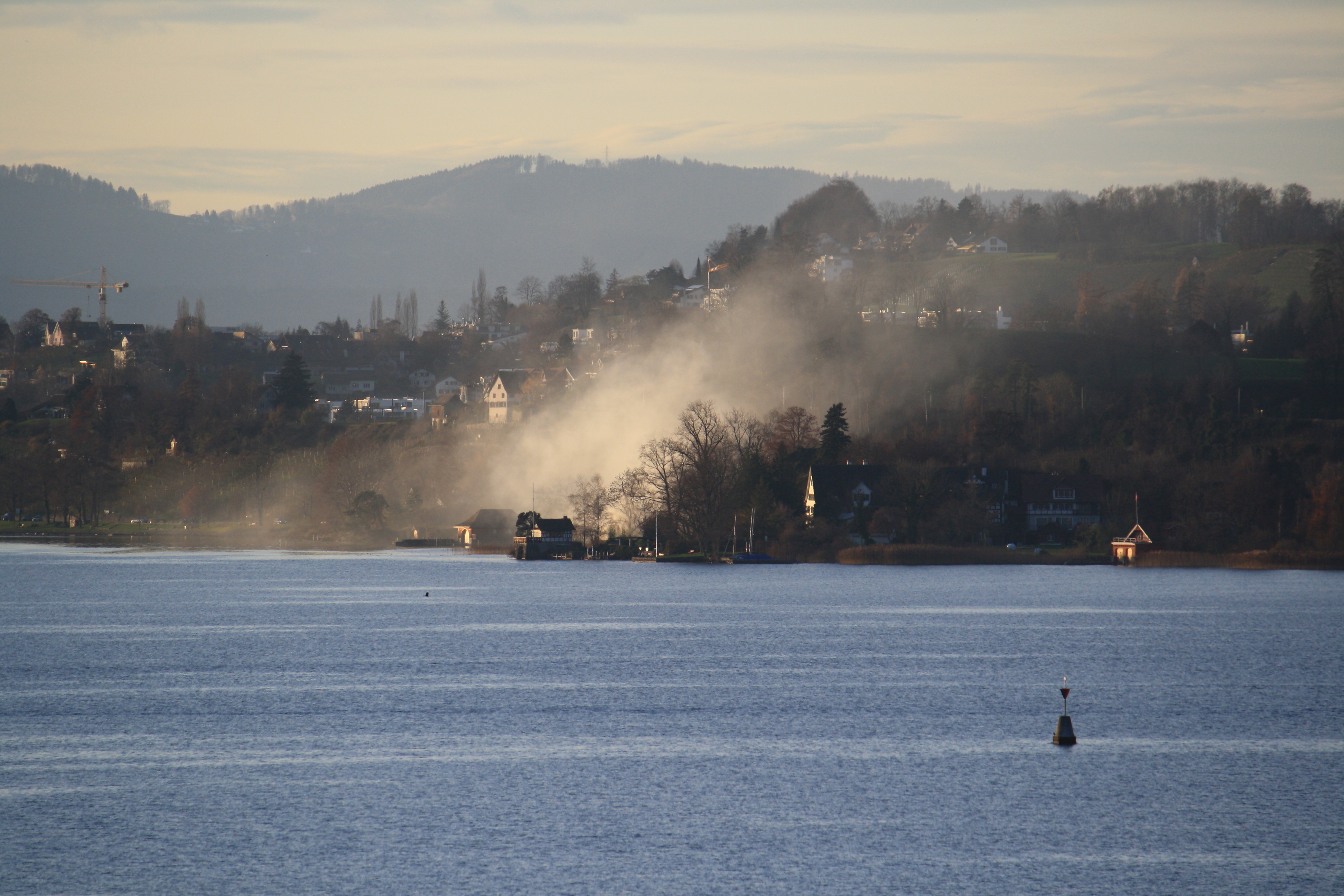 Stäfa on Zürichsee (Lake Zürich) shore in Switzerland, as seen from Lindenhof in Rapperswil (SG), Albis and Zimmerberg in the background.